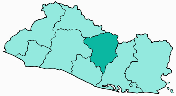 Mappa della diocesi cattolica di San Vicente, in El Salvador. Lavoro personale eseguito a partire da questa immagine di Commons. Fonte per i confini delle diocesi